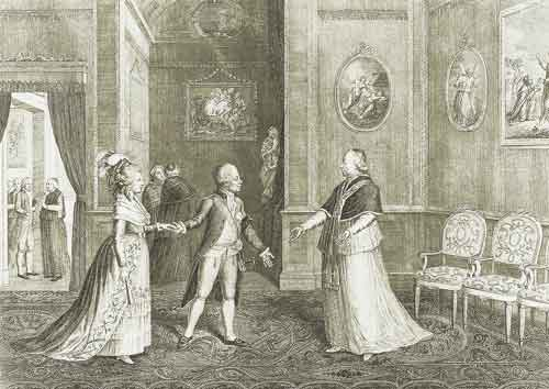 The meeting of Pius VI with Comte du Nord (aka Paul of Russia) and his wife Marie Прием папой Пием VI графа и графини Северных 8 февраля 1782 года. 1801. Офорт А. Лаццарони.